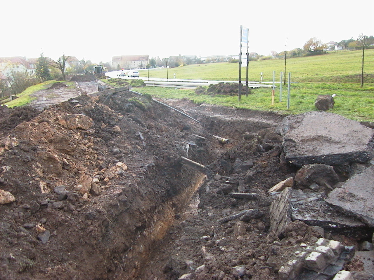 Bei Bauarbeiten freigelegte Gleisreste der ehem. Liebensteiner Bahn, an der Umgehungsstraße / Ortsausgang Bad Liebenstein in Richtung Steinbach